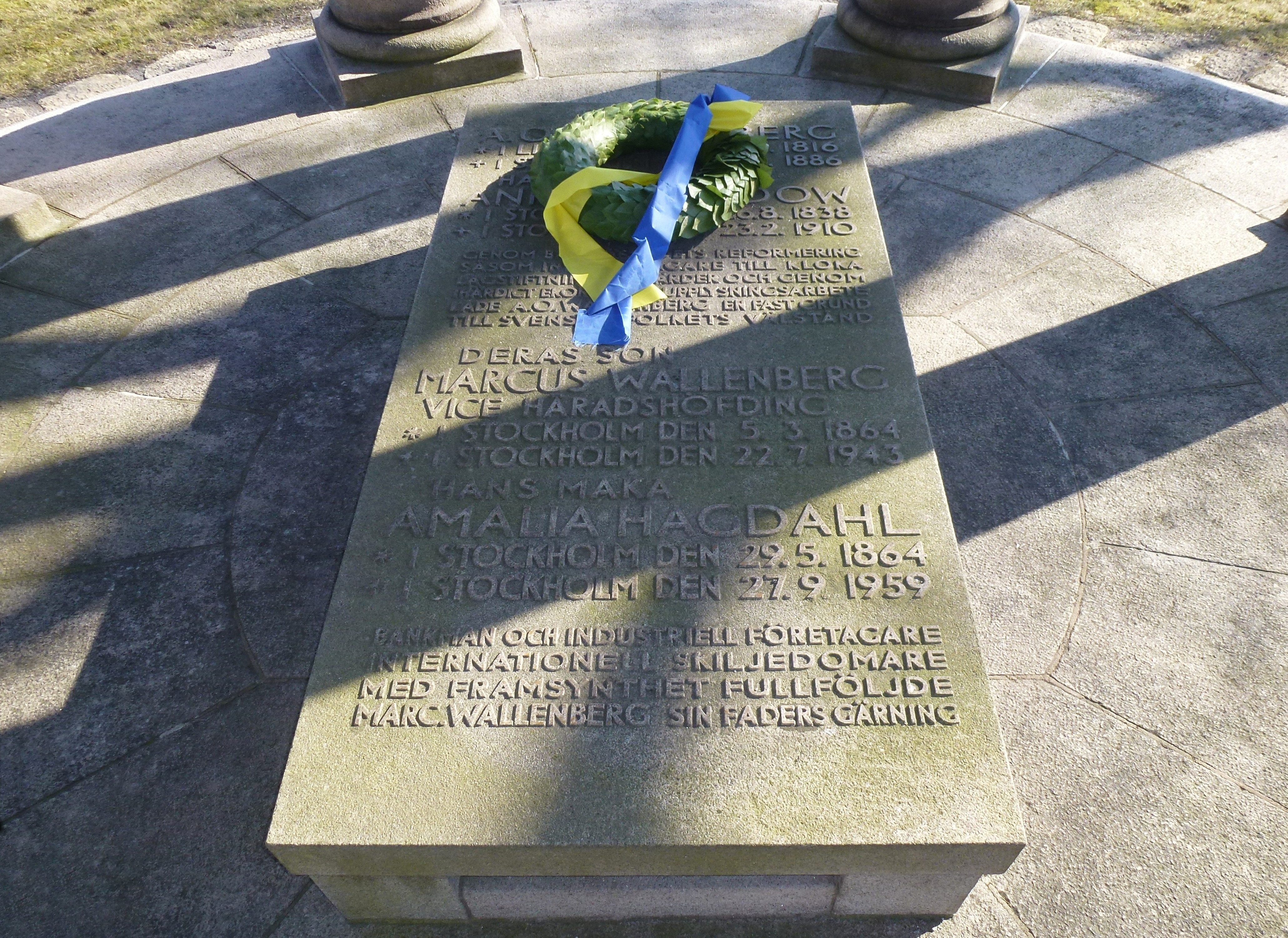 Wallenberg-mausoleum, O.A. Wallenberg